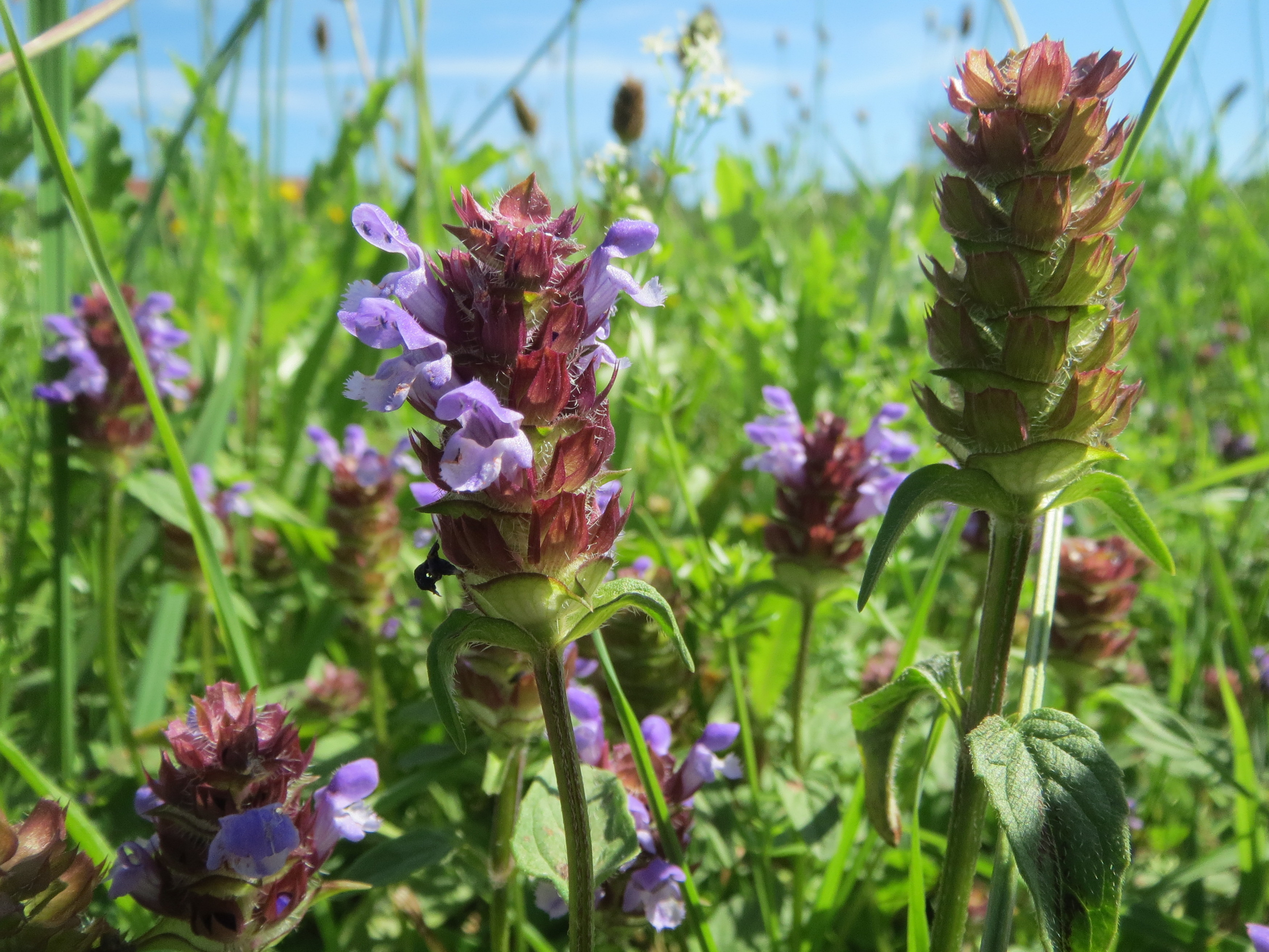 Kleine Braunelle (Prunella vulgaris) im Hockenheimer Rheinbogen